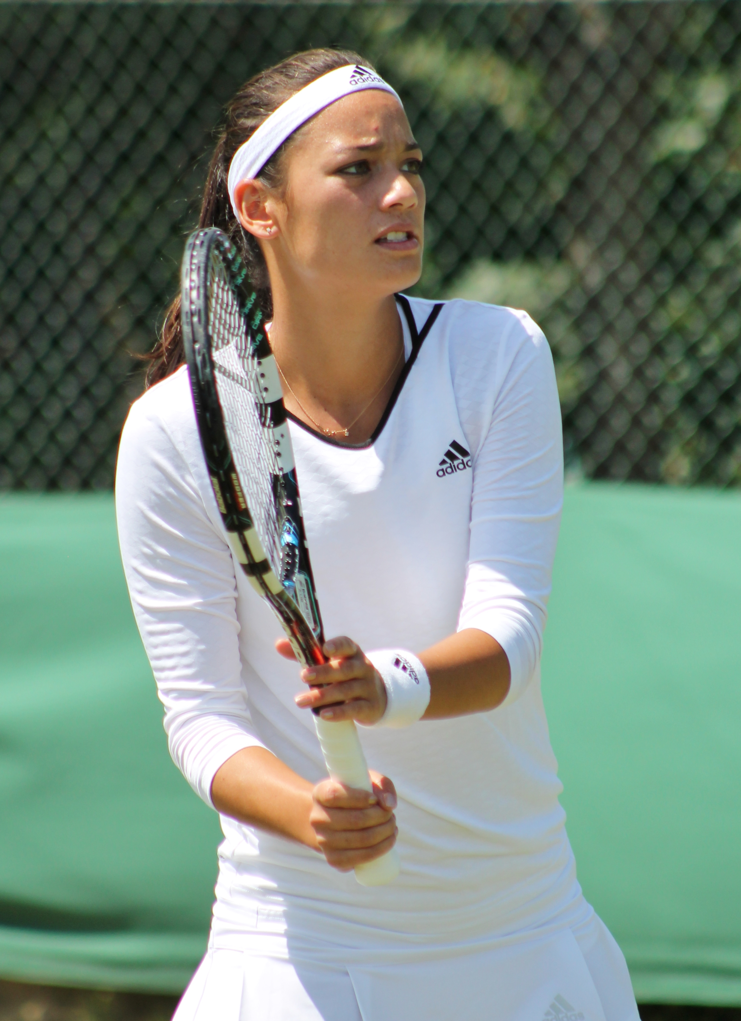 Lim WMQ14